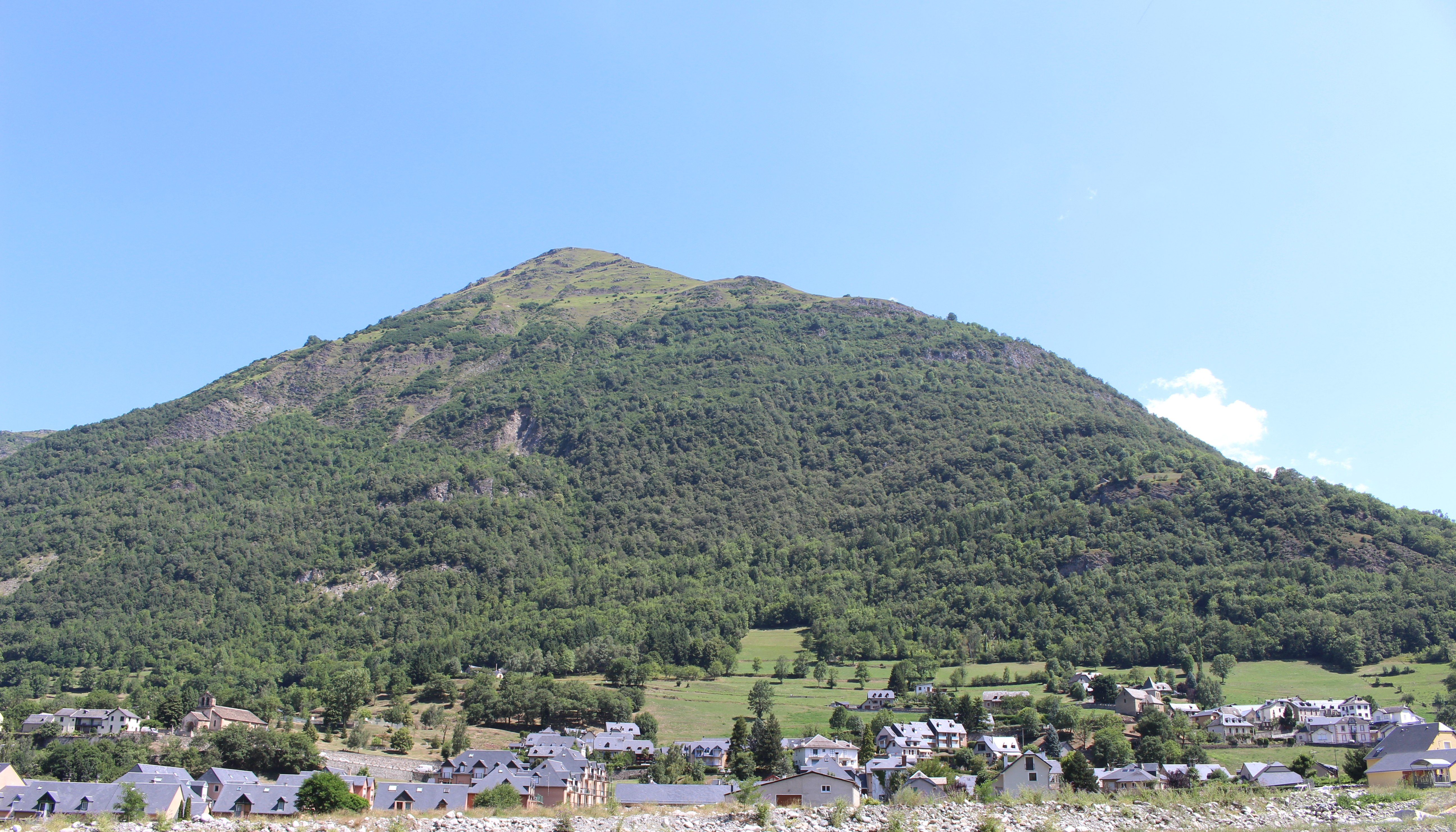 Esquièze-Sère (Hautes-Pyrénées)